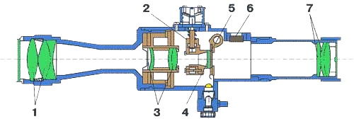 Оптическая система ПСО-1